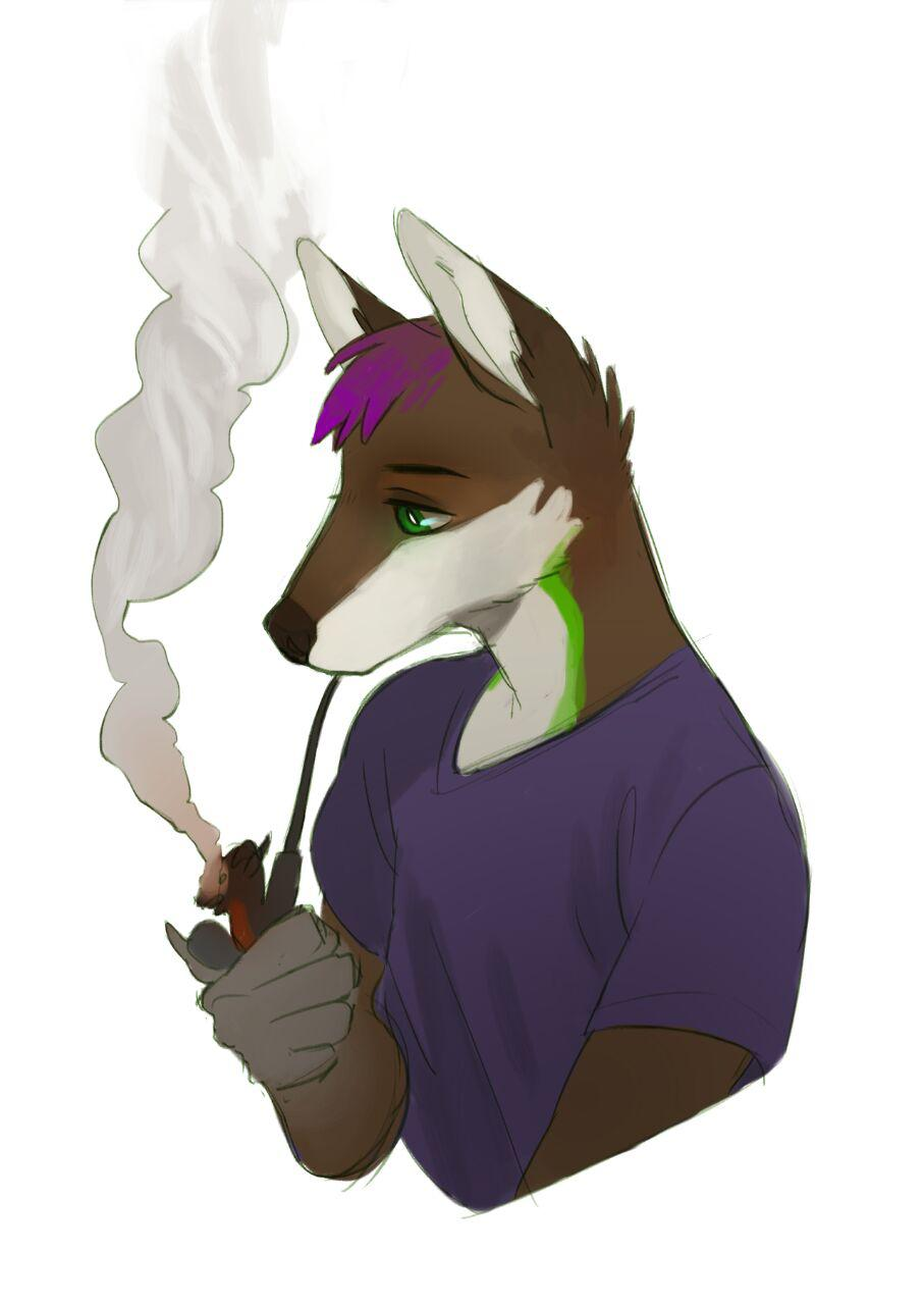 He likes smoking fancy stuff